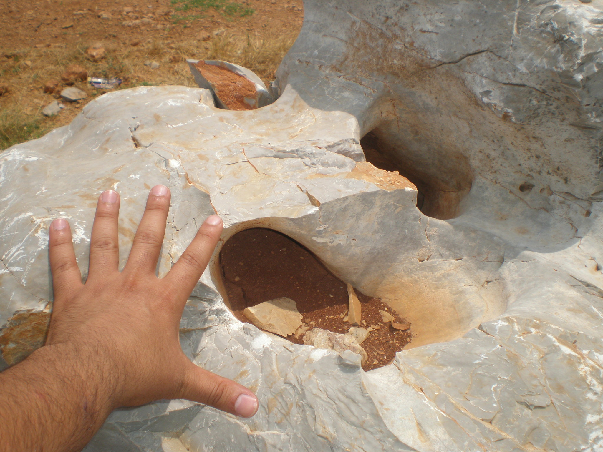 Lapya örneği